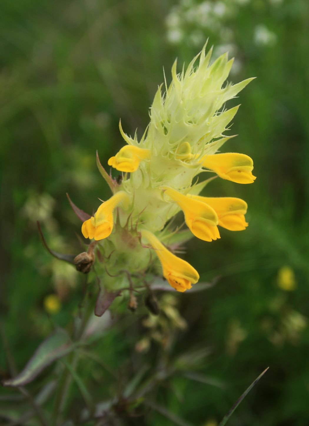 Karst-Wachtelweizen (Melampyrum barbatum subsp. carstiense), Sommerwurzgewächse (Orobanchaceae) - Slowenien/Slovenija/Slovenia: Primorska, "Prärie" NNW Praproče